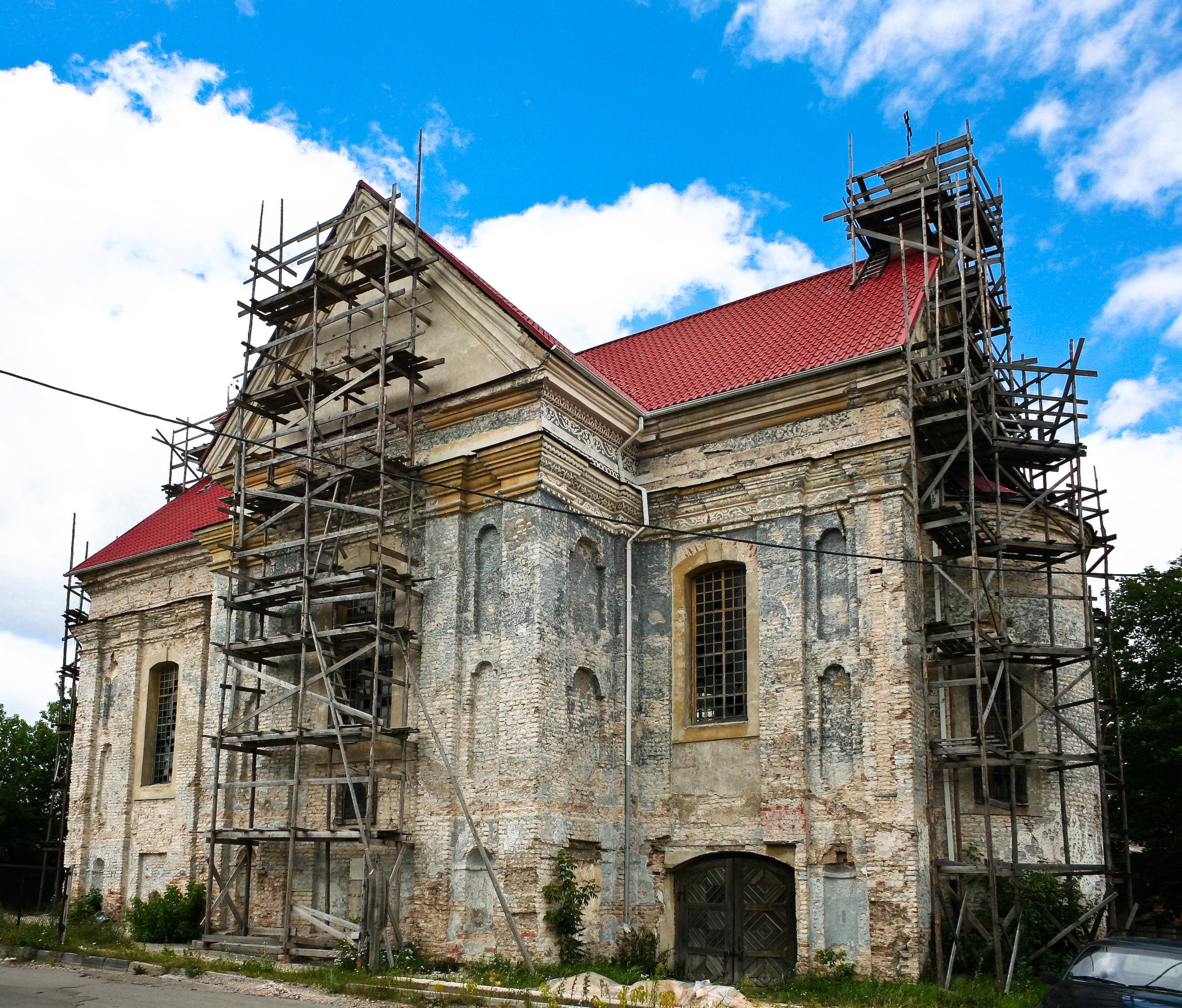 St. Stephen's Church in Vilnius